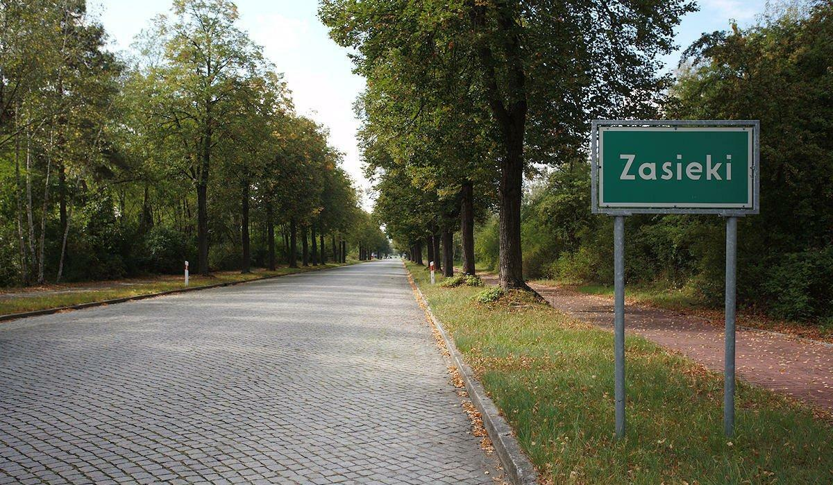 Wjazd do Zasieków, dawnej prawobrzeżnej dzielnicy miasta Forst, zwanej Berge. Proszę zwrócić uwagę na wielkość ulicy i jej chodników, które de facto wiodą donikąd. Zasieki są bodaj jedyną wsią w Polsce o tak szerokich ulicach i chodnikach. Dawna ulica, a dzisiaj raczej droga, obsadzona jest wiekowymi lipami, stąd zakładam, że nazywała się Lindenalee:) Tak naprawdę mam kłopoty z przedwojennymi nazwami ulic tej miejscowości, bowiem nie mogę dokopać się do przedwojennego planu miasta Forst.